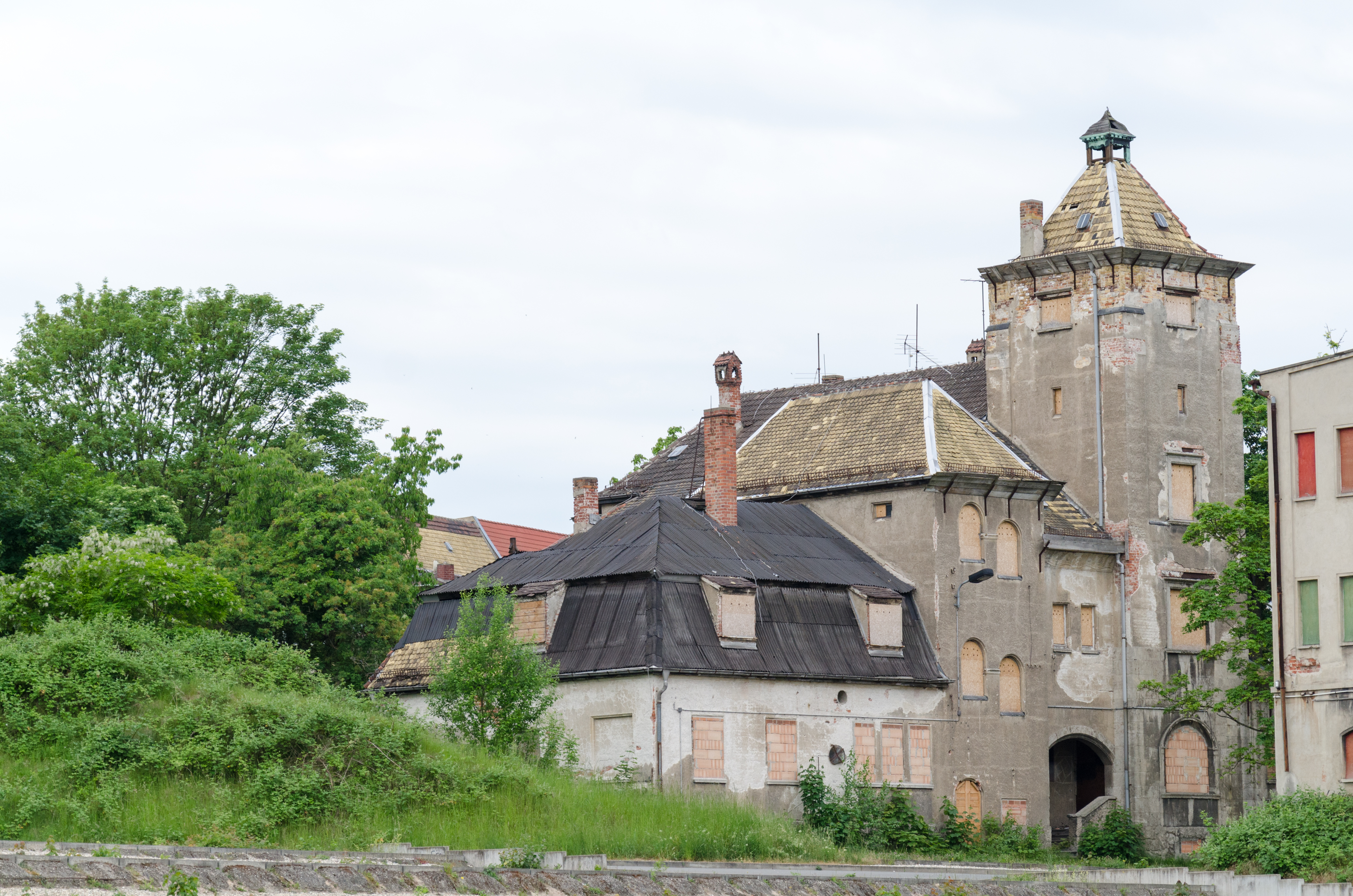 Zeitz, Geraer Straße 3